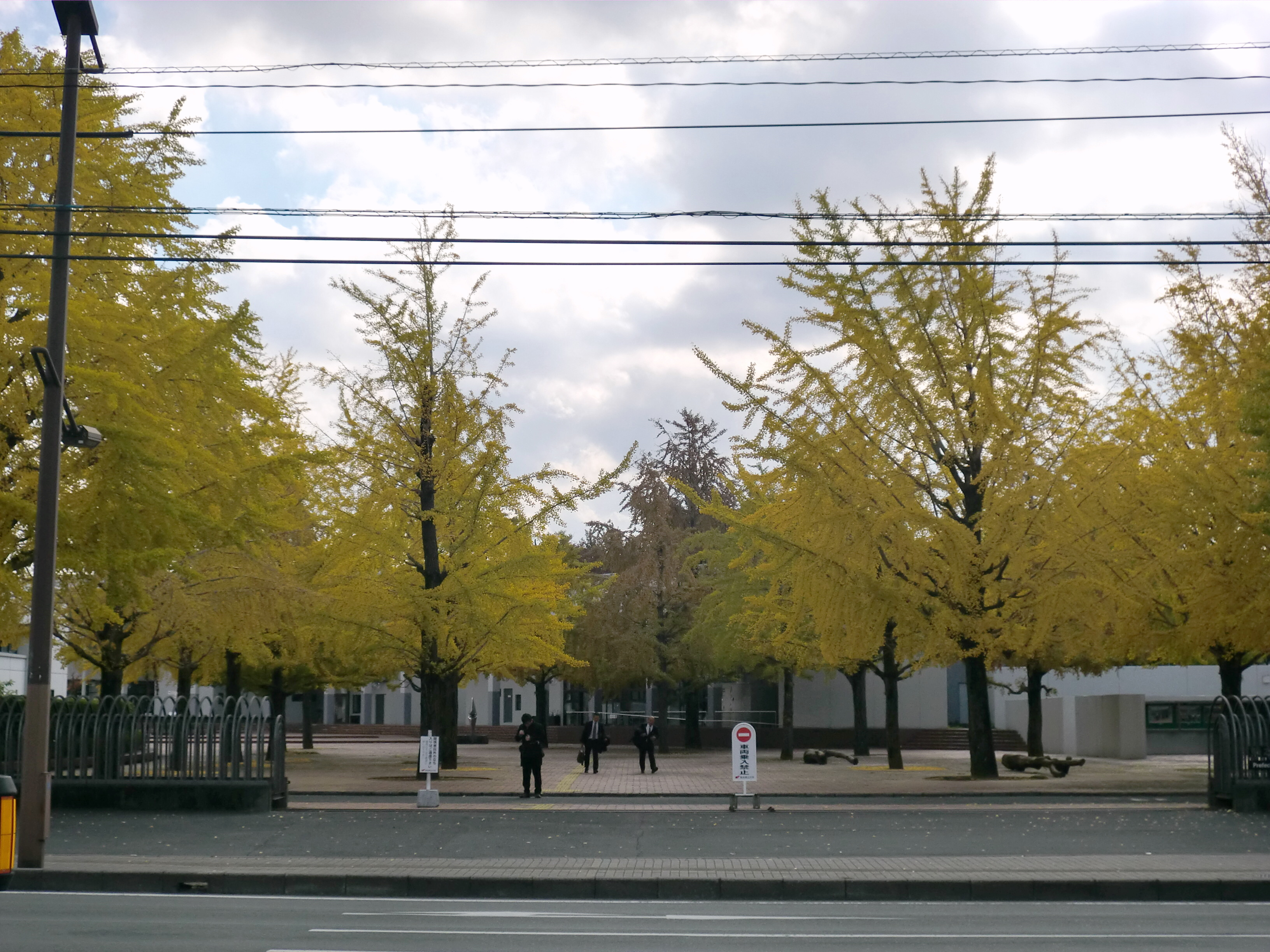 熊本市東区にある熊本県立大学